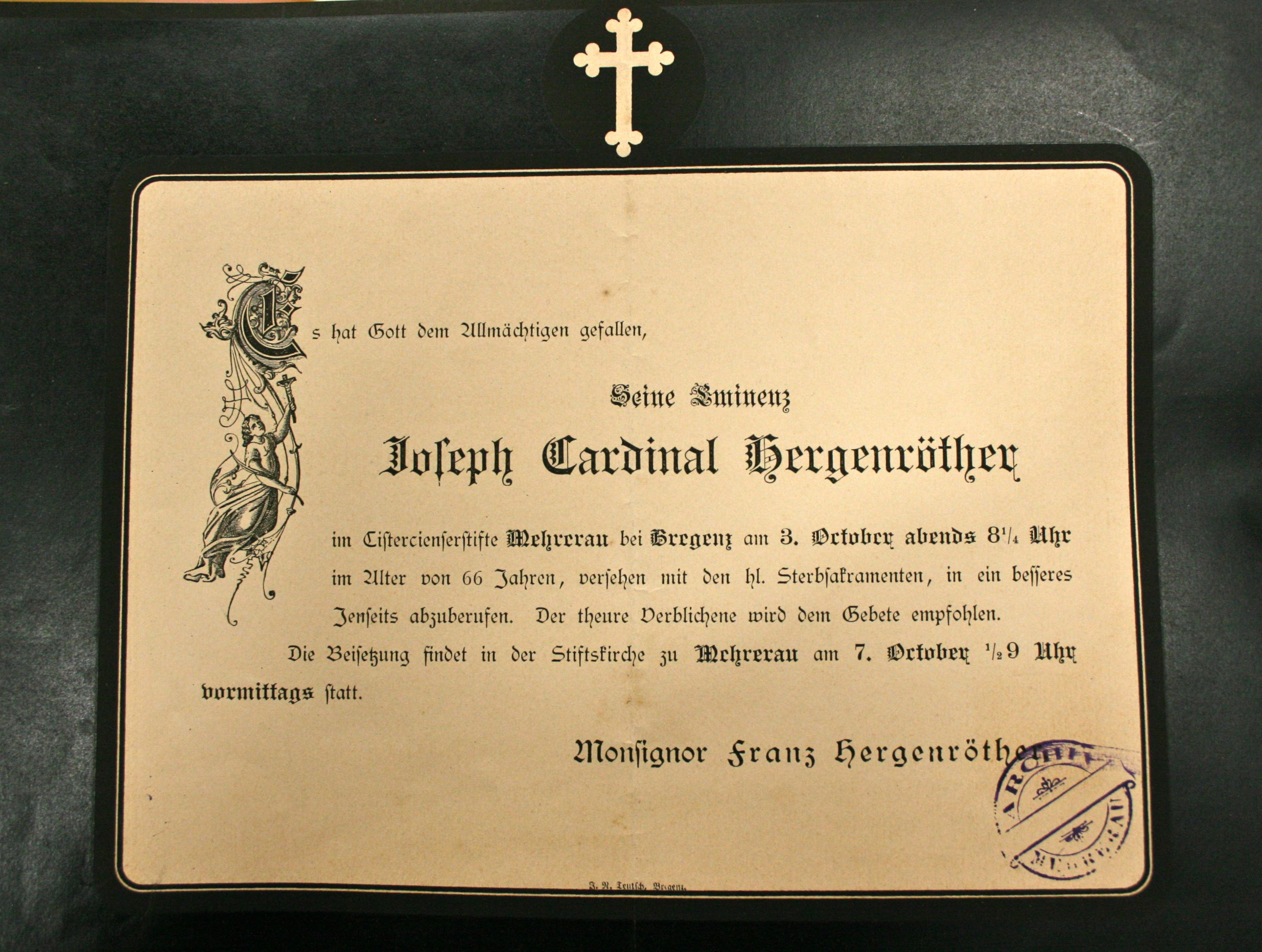 Kardinal Hergenröther war ein führender Kirchenhistoriker des 19. Jahrhunderts. Siehe deutsche Wiki.